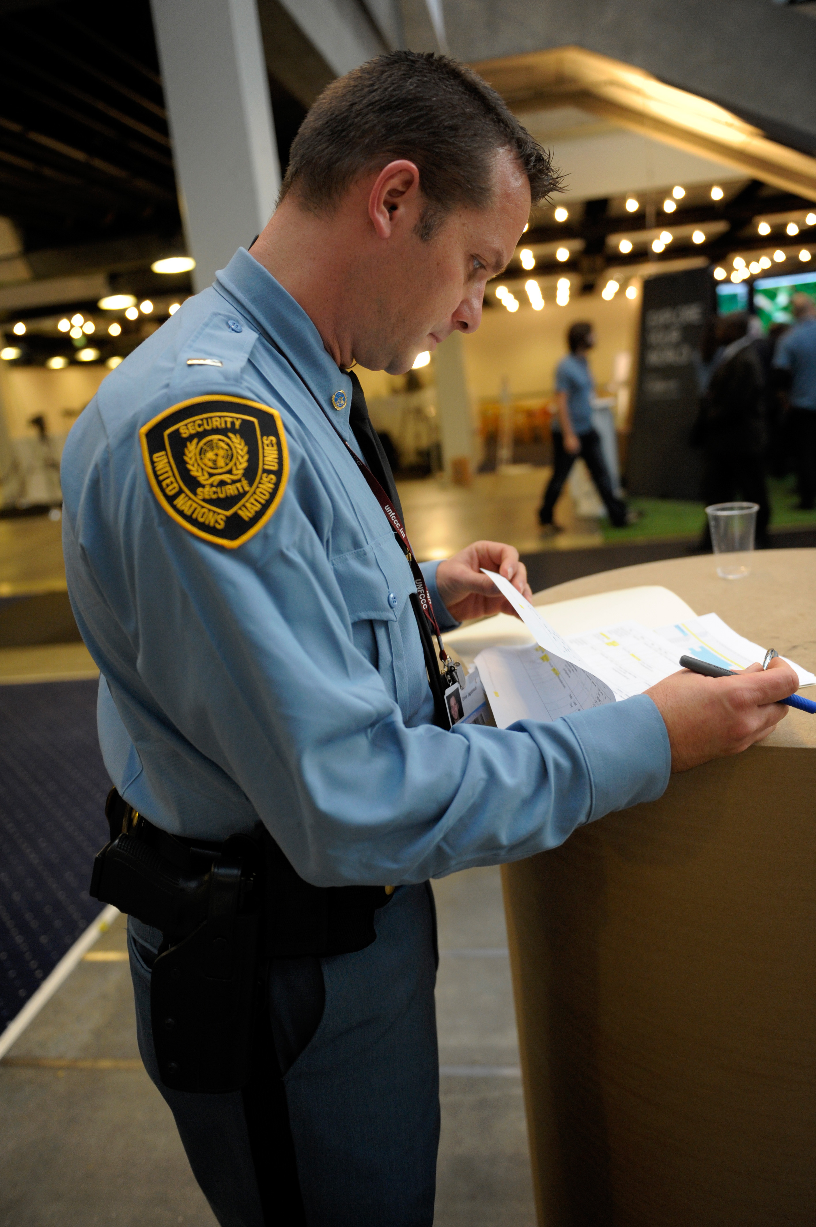 FN polis vid COP15 i Köpenhamn 2009